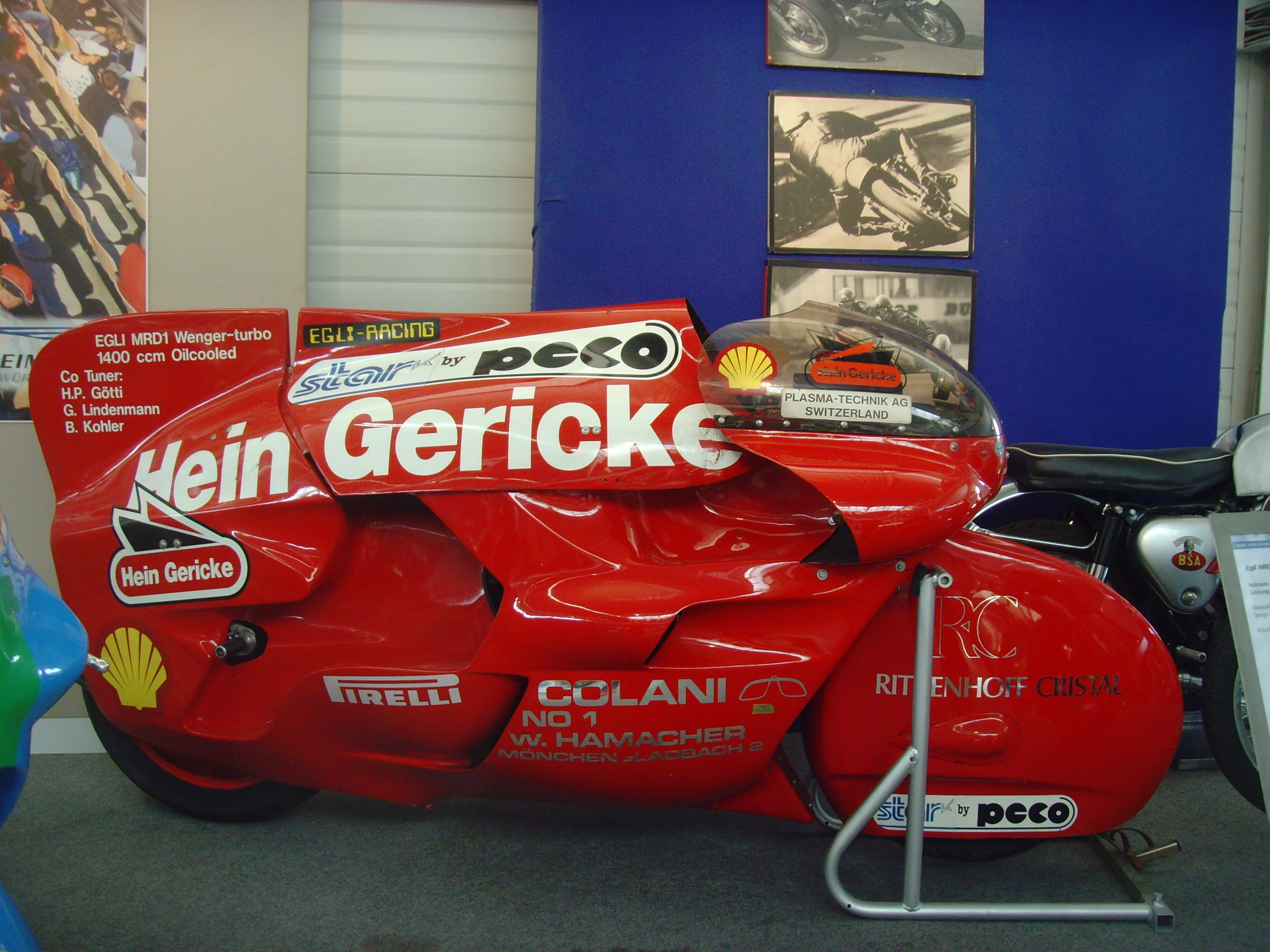 Egli-Colani im Motor-Sport-Museum am Hockenheimring